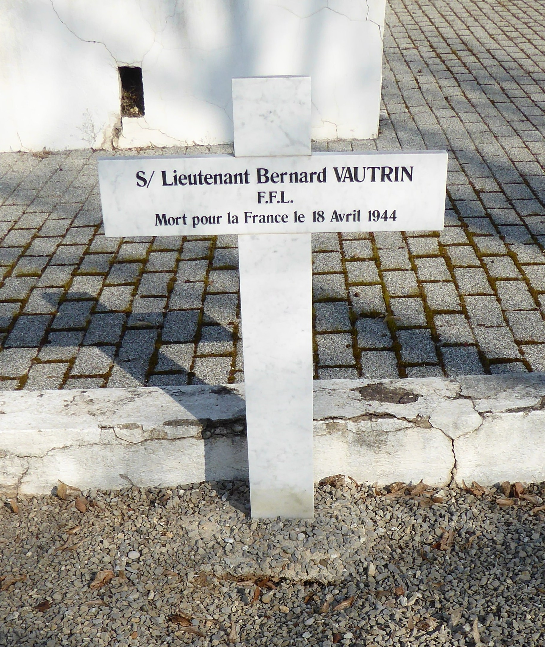 Cimetière Rabiac (Antibes)